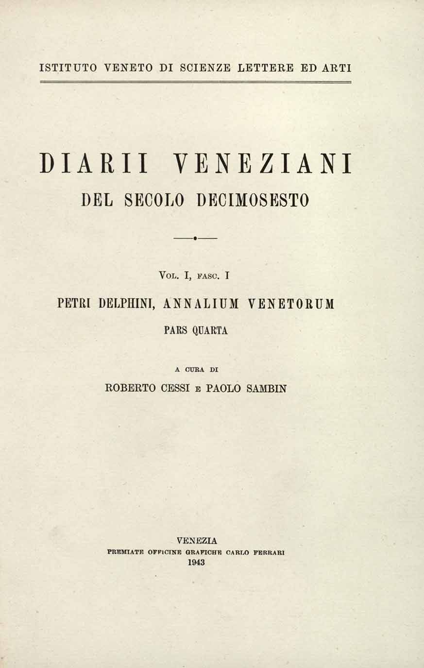 Vol 1., Fasc. 1. Petri Delphini Annalium venetorum pars quarta. Fascicolo I a cura di Roberto Cessi e Paolo Sambin. - Venezia : Officine grafiche Carlo Ferrari, 1943. - XXXVIII, 297 p., 3 c. tav. : ill. ; 25 cm .